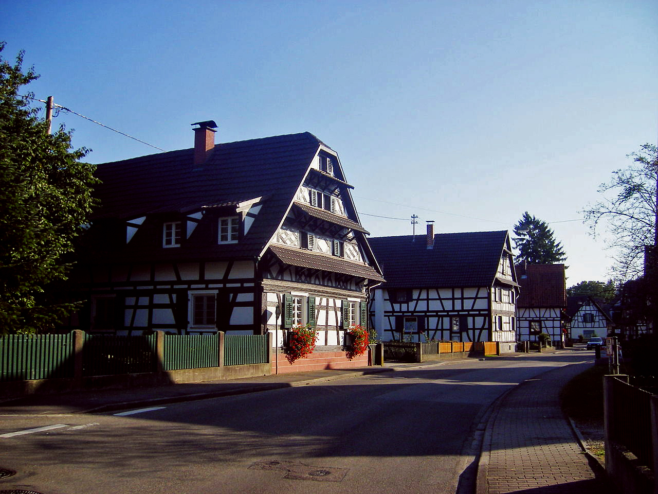 Eckartsweier (Willstätt municipality)